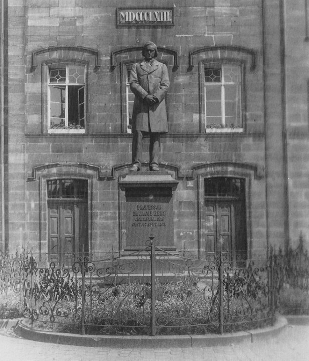 Erlangen. Das 5. Mai 1875 enthüllte Bronze-Denkmal für Jakob Herz auf dem damaligen Holzmarkt (heute Hugenottenplatz), Bildhauer: Caspar von Zumbusch, Guss: Christoph Lenz. Am 15. September 1933 wurde das erste Denkmal für einen Juden in Bayern entfernt und zerstört. Seit 5. Mai 1983 erinnert die Jakob-Herz-Stele in der Krankenhausstraße an den Chirurgen. Seit 15. September 2000 erinnert eine Gedenktafel an den ehemaligen Standort des Herz-Denkmals.